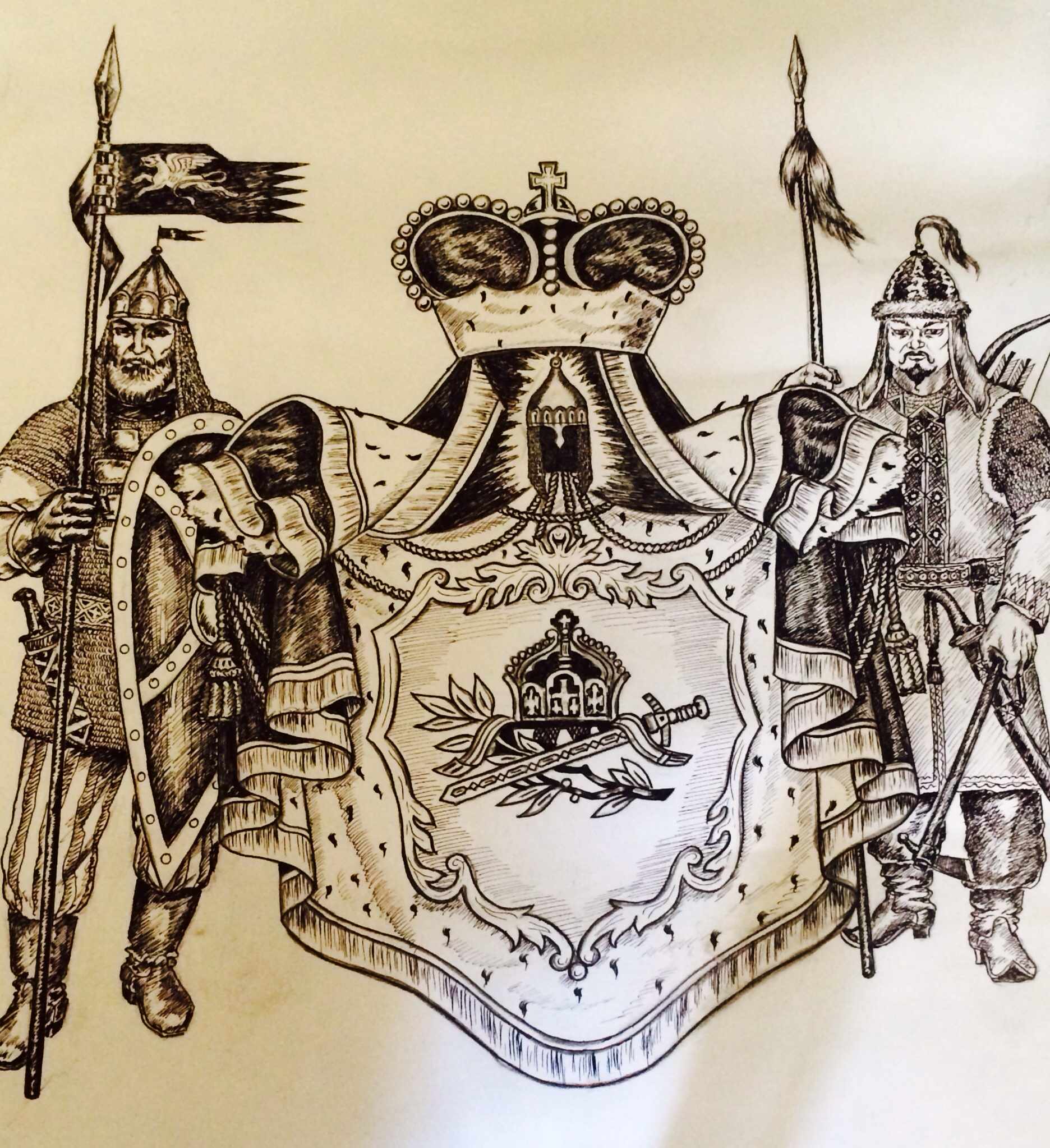 Герб дворян рода Бурковых ( не вошедший , как и некоторые другие, в общий гербовник дворянских родов Российской империи )